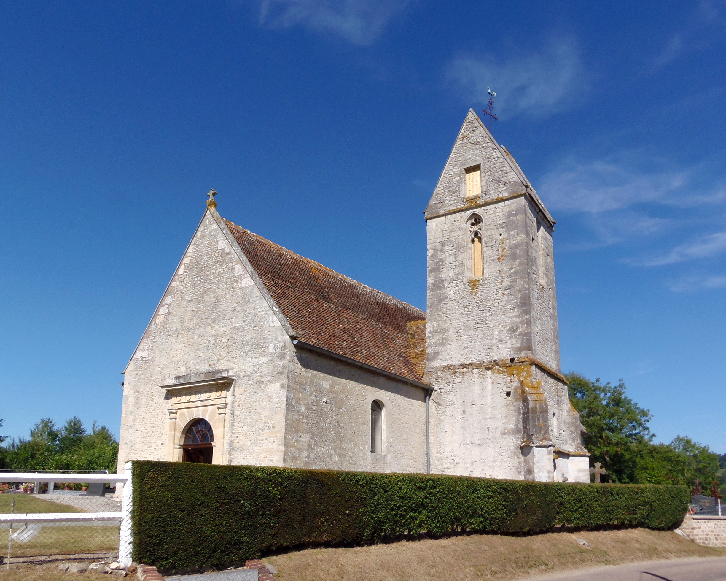 Montreuil-la-Cambe (Normandie, France). L'église Saint-Aubin de Montreuil.